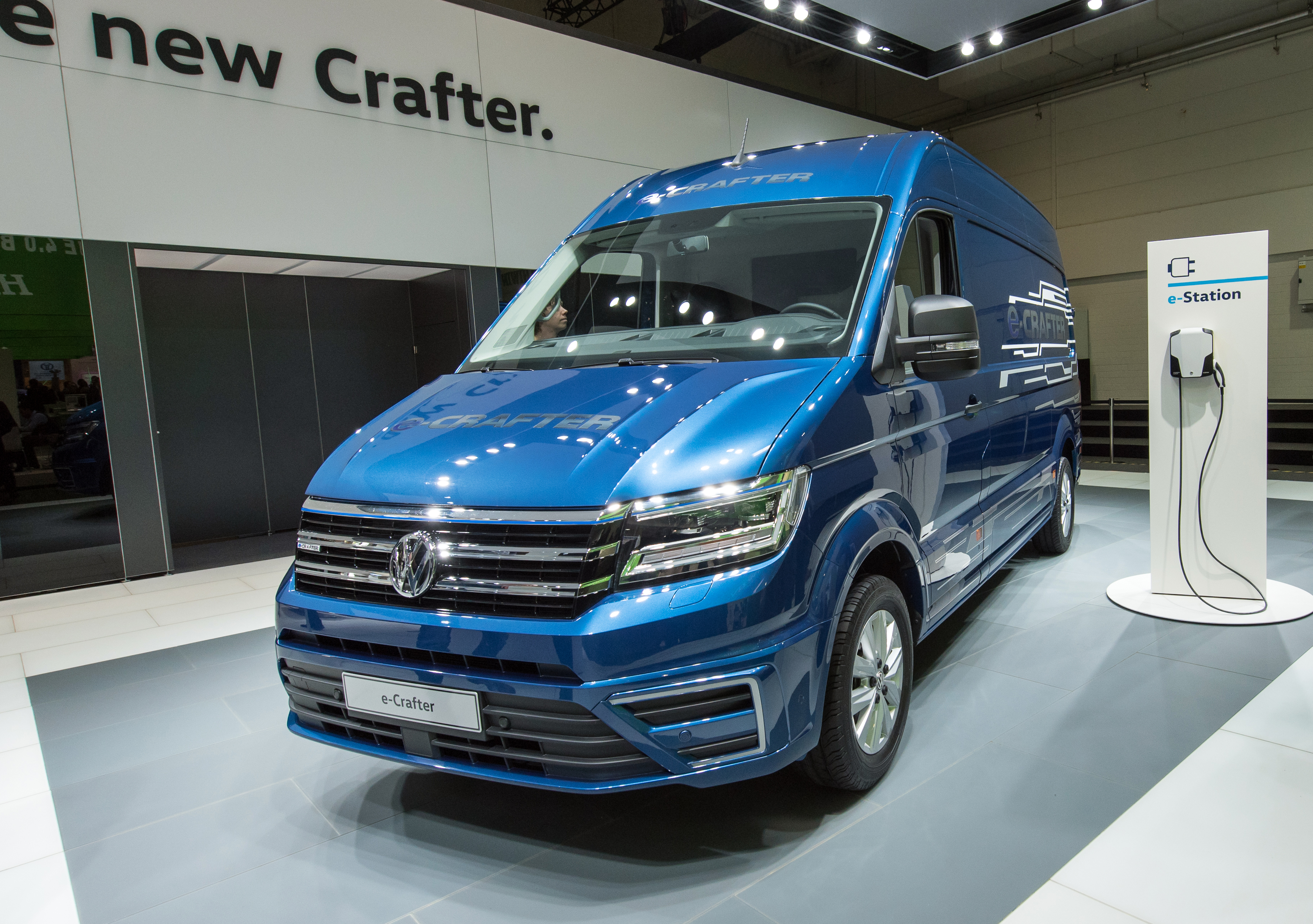 VW e-Crafter auf der Hannover-Messe 2017